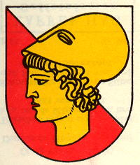 Wappen von Lovatens Kanton Waadt Schweiz